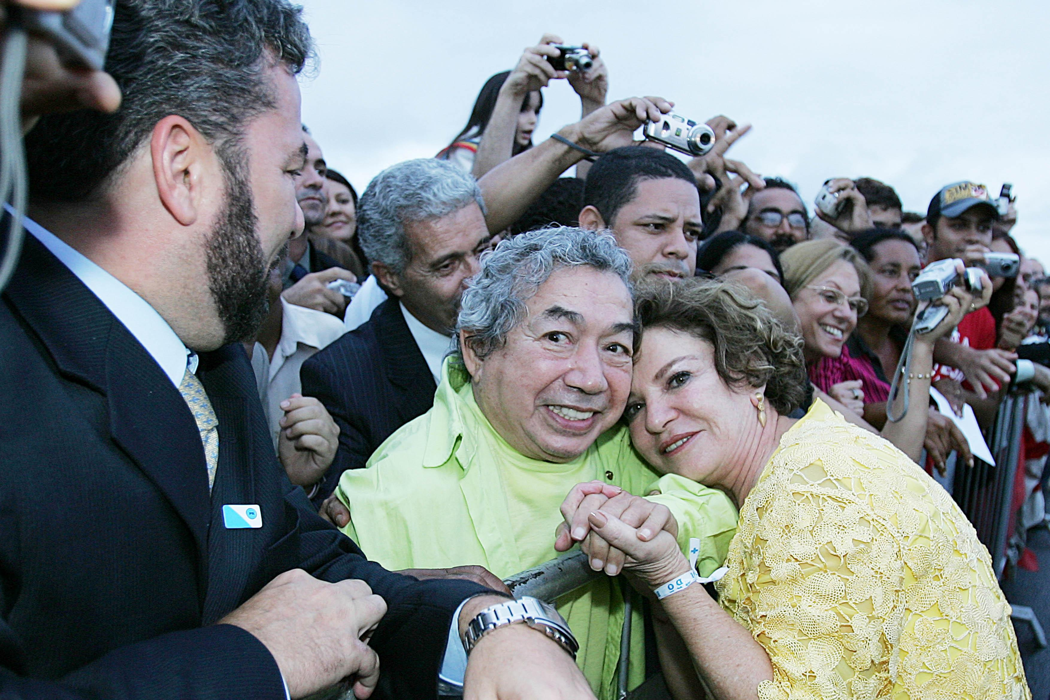 A primeira-dama Marisa Letícia e o carnavalesco Joãosinho Trinta, na festa de posse do Presidente Lula em Brasília. 2 de janeiro de 2007